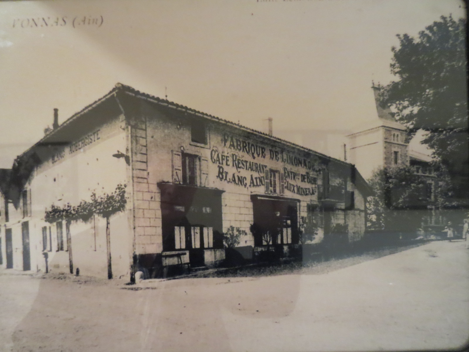 Ancienne Auberge de la Mère Blanc (Vonnas)